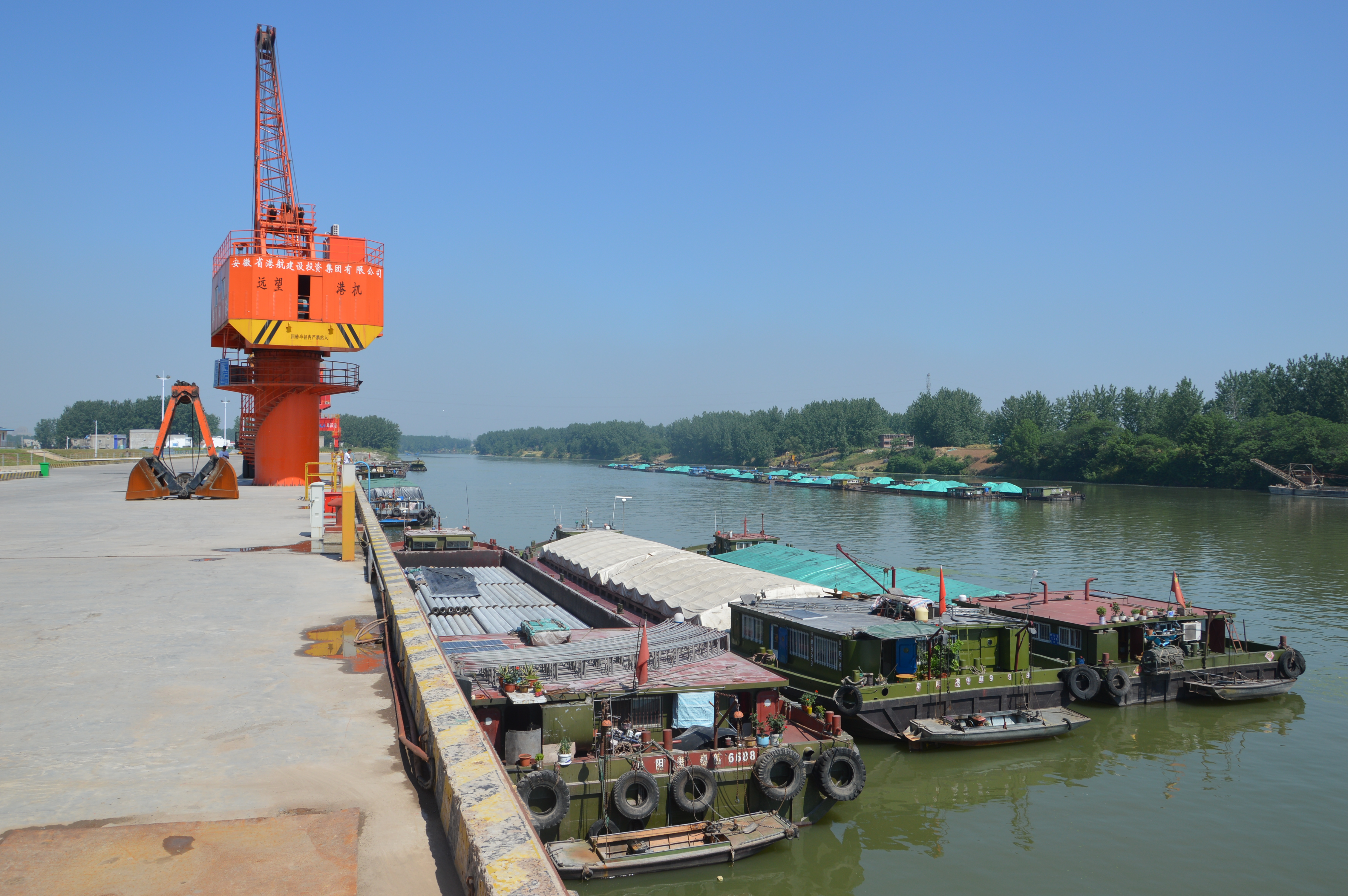 安徽省阜阳市颍州区三十里铺镇沙颍河畔颍州港